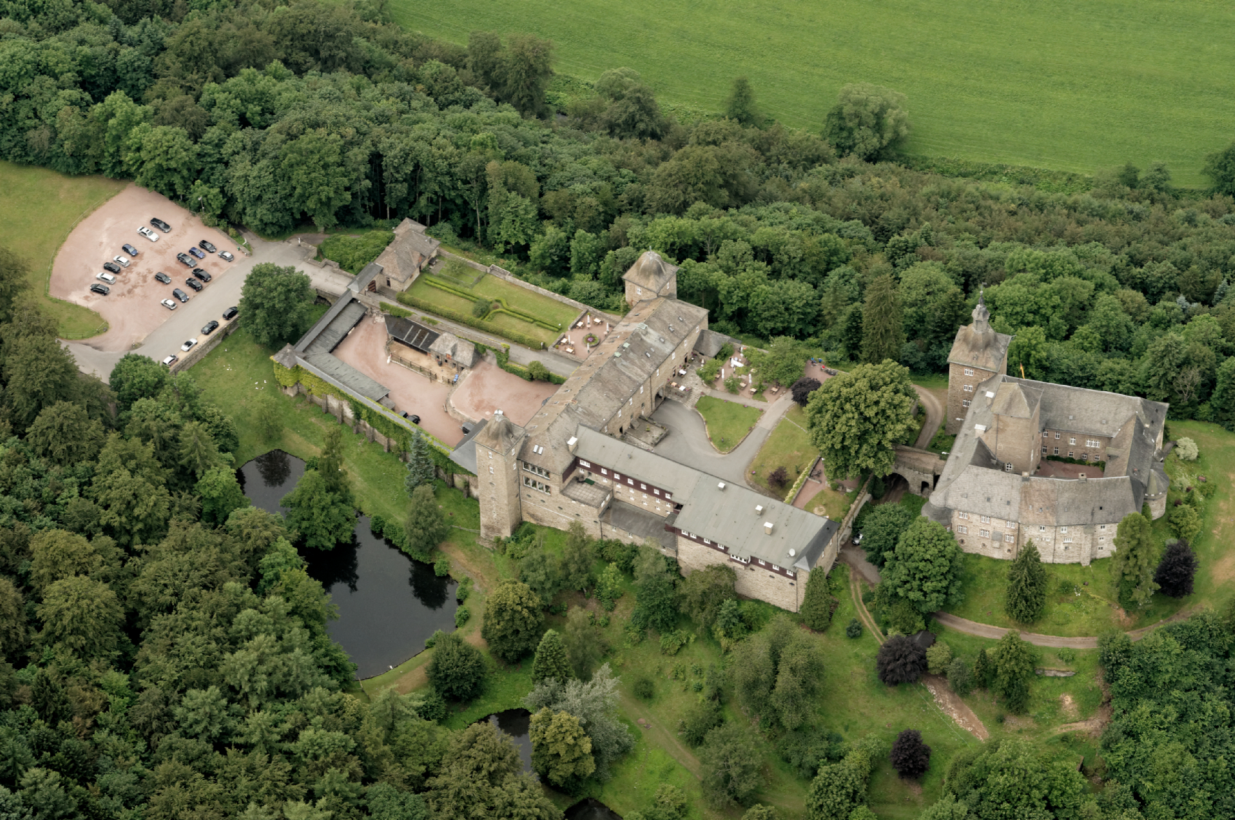 Fotoflug Sauerland-Nord. Attendorn, Burg Schnellenberg The making of this document was supported by the Community-Budget of Wikimedia Germany.